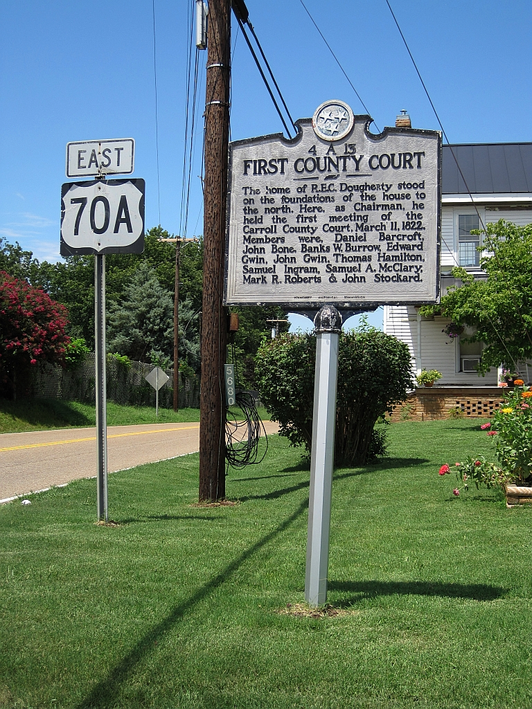 McLemoresville, Tennessee.